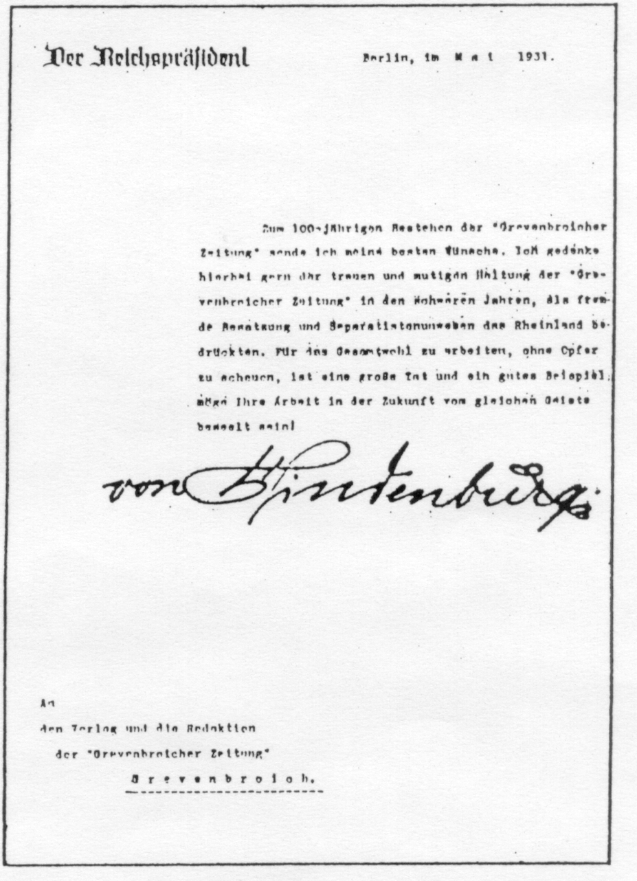 Glückwunschadresse von Reichspräsident Paul von Hindenburg an die Grevenbroicher Zeitung anlässlich des 100jährigen Bestehens